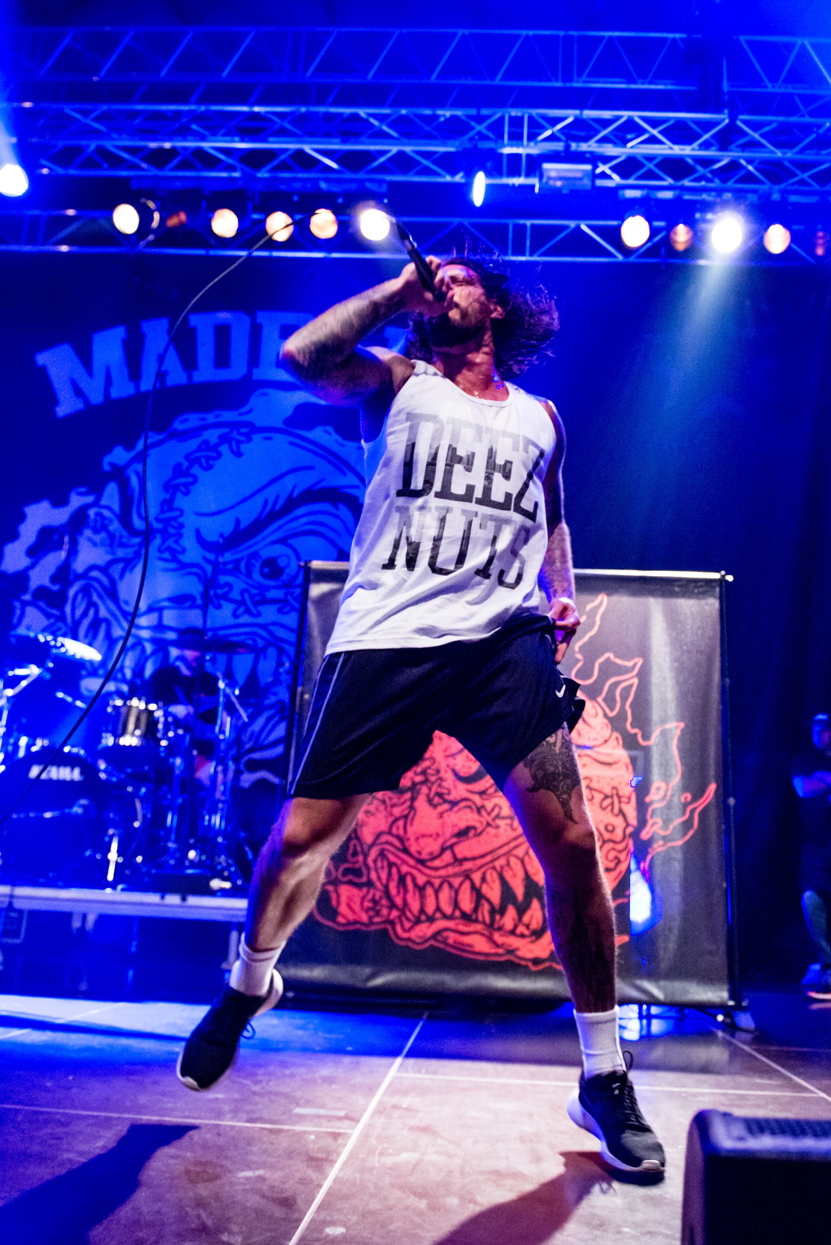 'Impericon Festival 2015; Oberhausen Turbinenhalle': 'Madball'